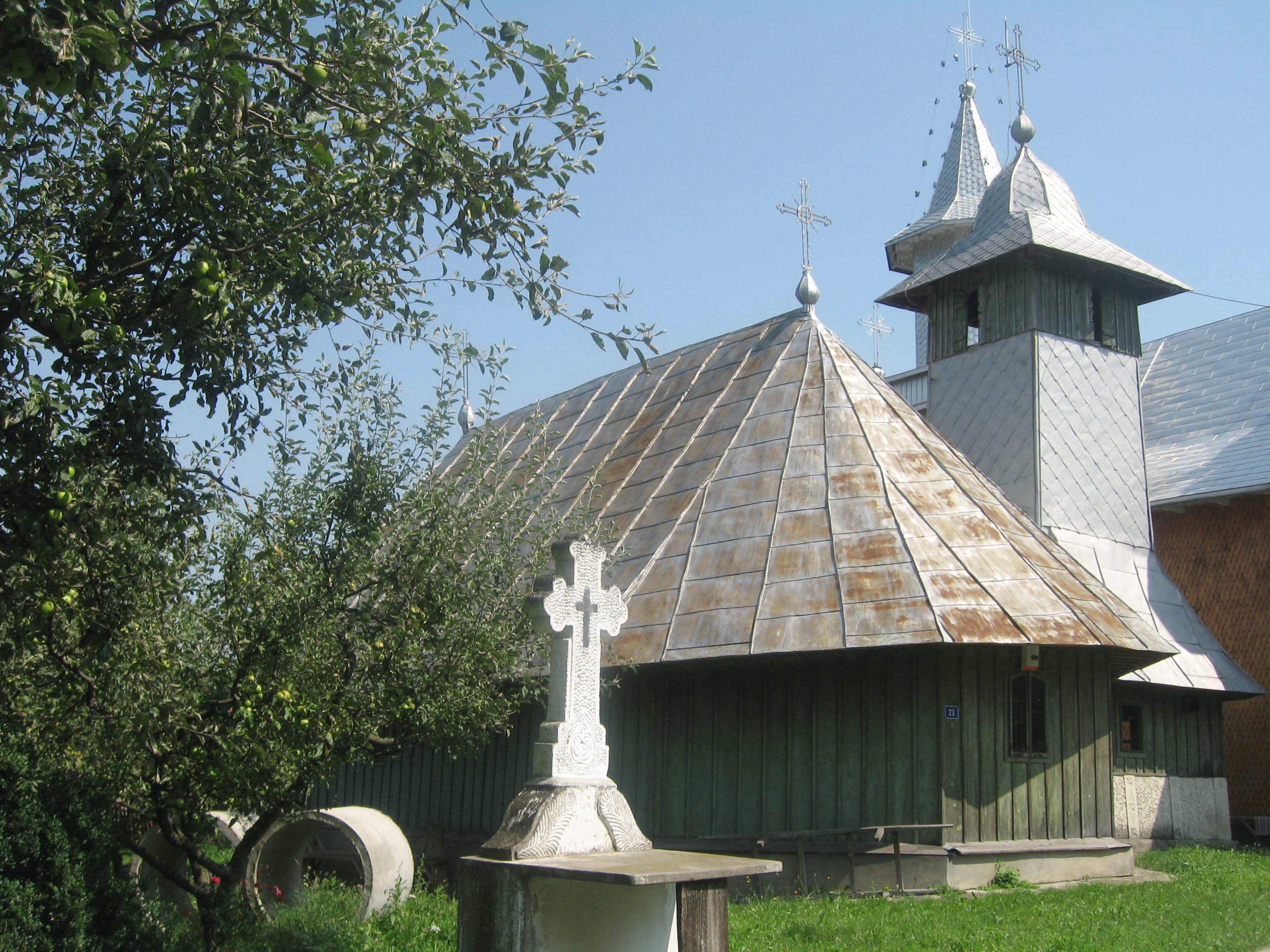 Biserica de lemn din Lămăşeni, judeţul Suceava